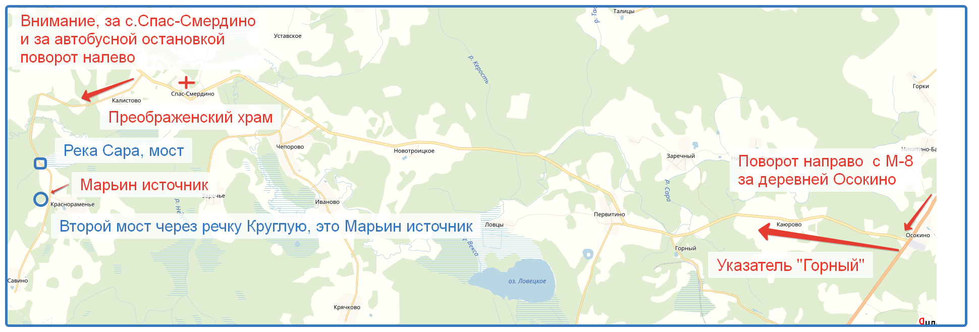 Схема проезда к Марьиному источнику